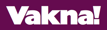 Vakna!:s logotyp, från marsnumret 2015.